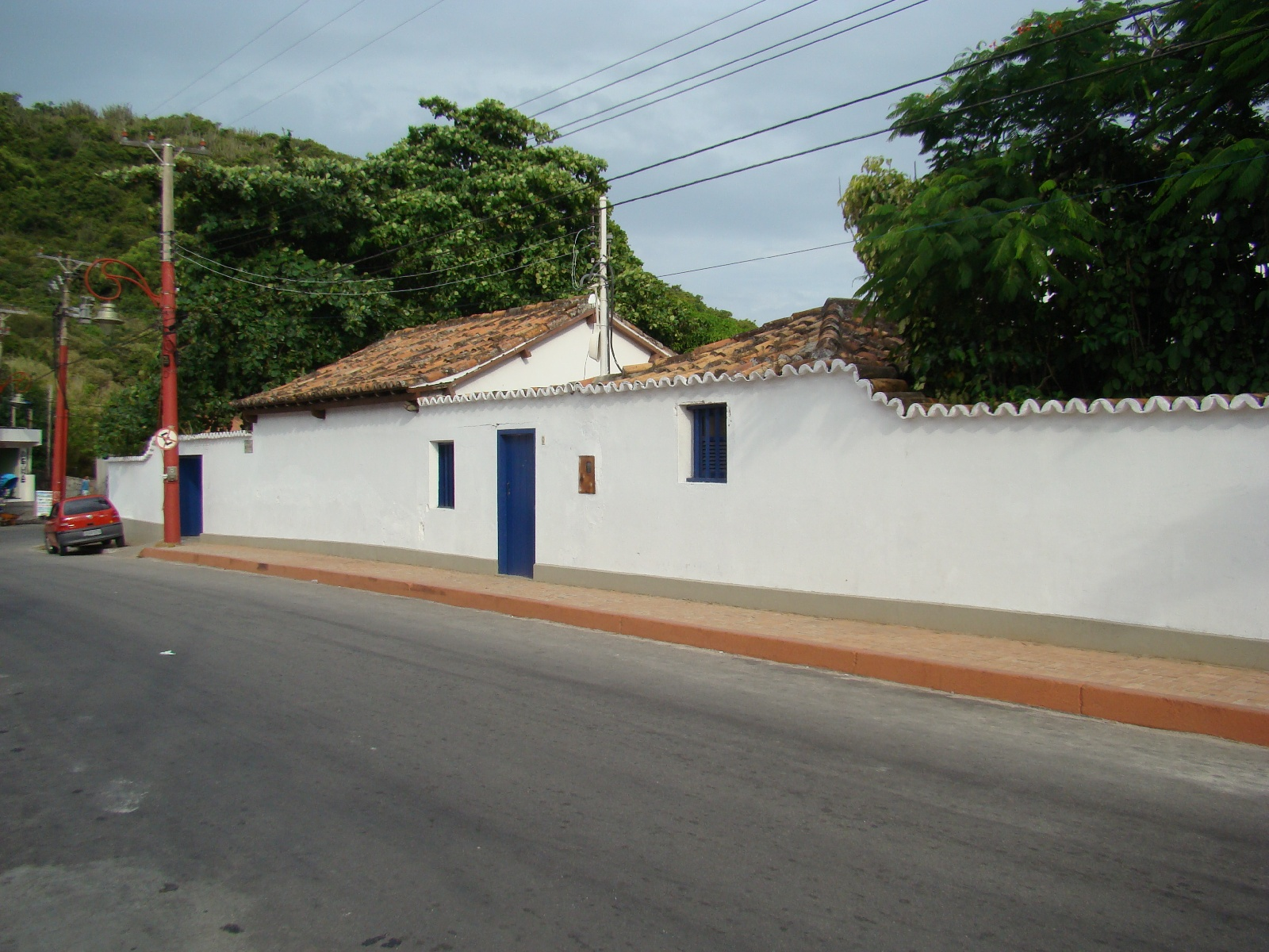 Foto da "Casa da Piedra", uma das primeiras edificações em solo brasileiro